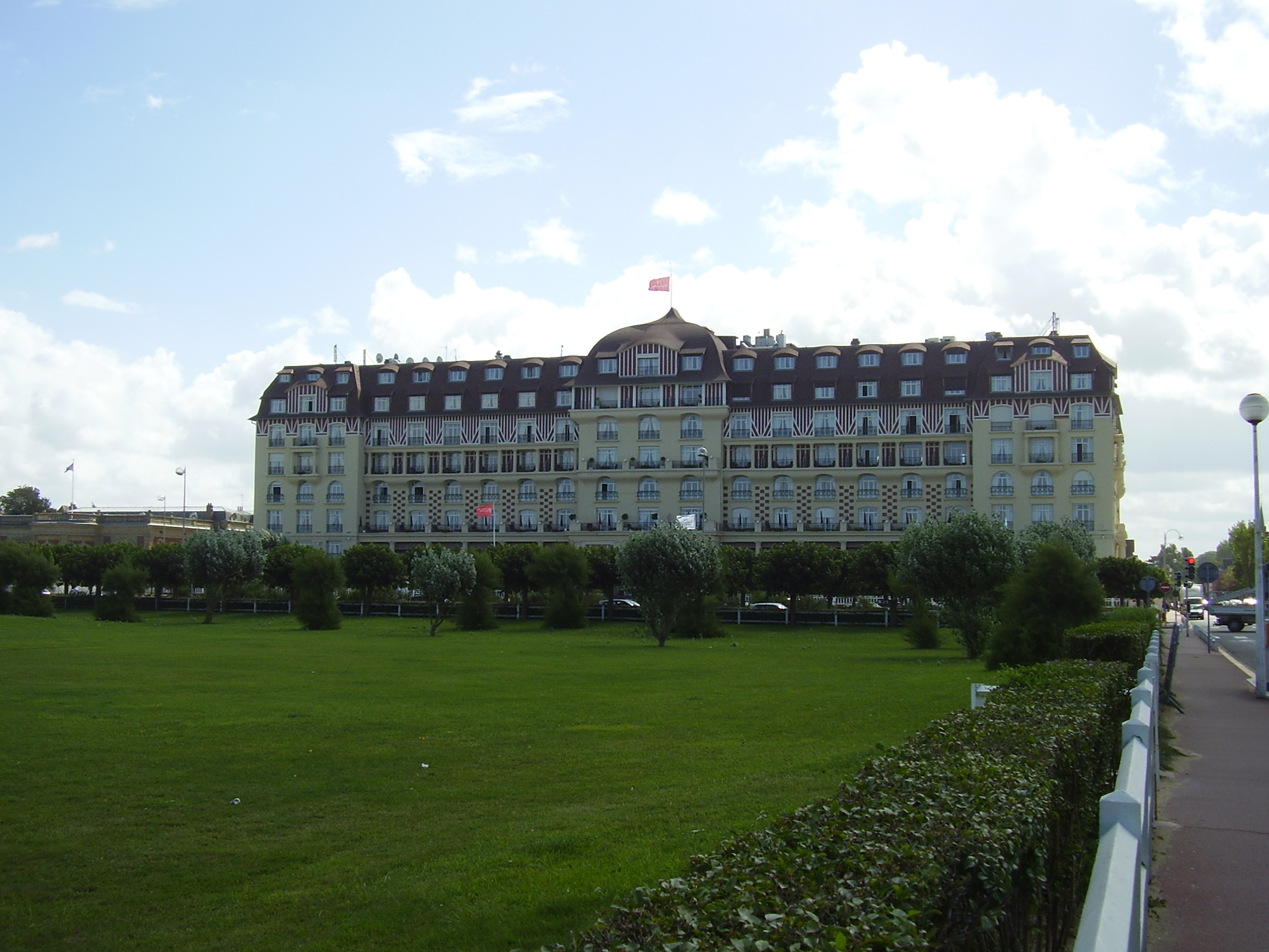 Hôtel Royal, Deauville, Frankreich